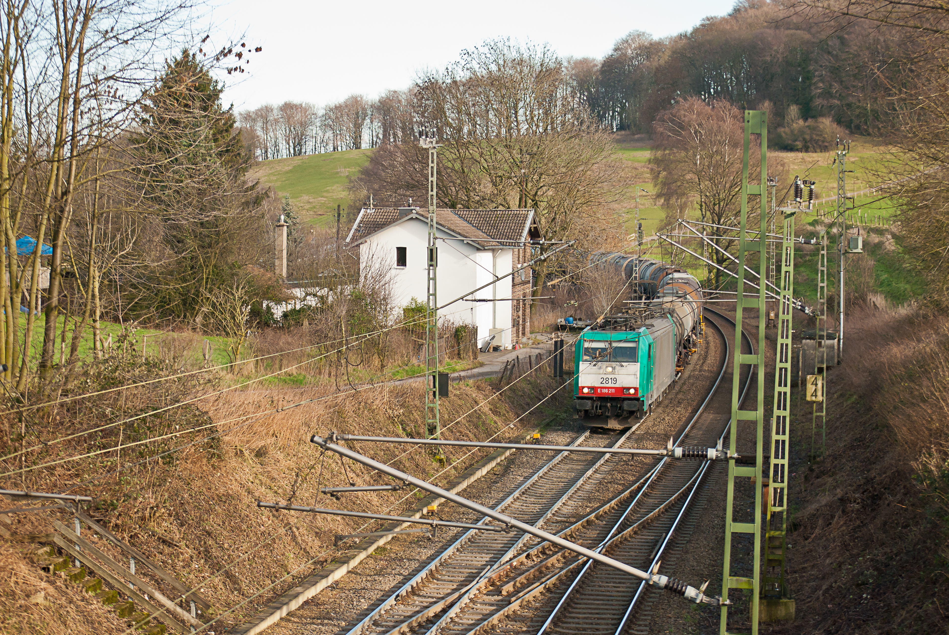 Kesselwagenganzzug auf Bergfahrt auf der Montzenroute zwischen Aachen West und dem Gemmenicher Tunnel kurz vor dem Erreichen des Tunnels. Die Bahnstrecke fährt hier das Tal des Dorbaches zwischen dem im Hintergrund rechts oben zu sehenden Friedrichswald und dem Vaalserberg bzw. der Flur "Auf dem Steppenberg" aus. Die Aufnahme entstand talwärts blickend von der Brücke des Geusenweges über den Schienenstrang. Zuglok: Lok 2819 der COBRA (Corridor Operations Belgium Rail) (Bombardier Traxx, SNCB-Reihe 28 (BR 186)), geleast von Angel Trains. Beim Zug handelt es sich um Güterzug Nr. 47562 Ludwigshafen - Antwerpen für BASF.